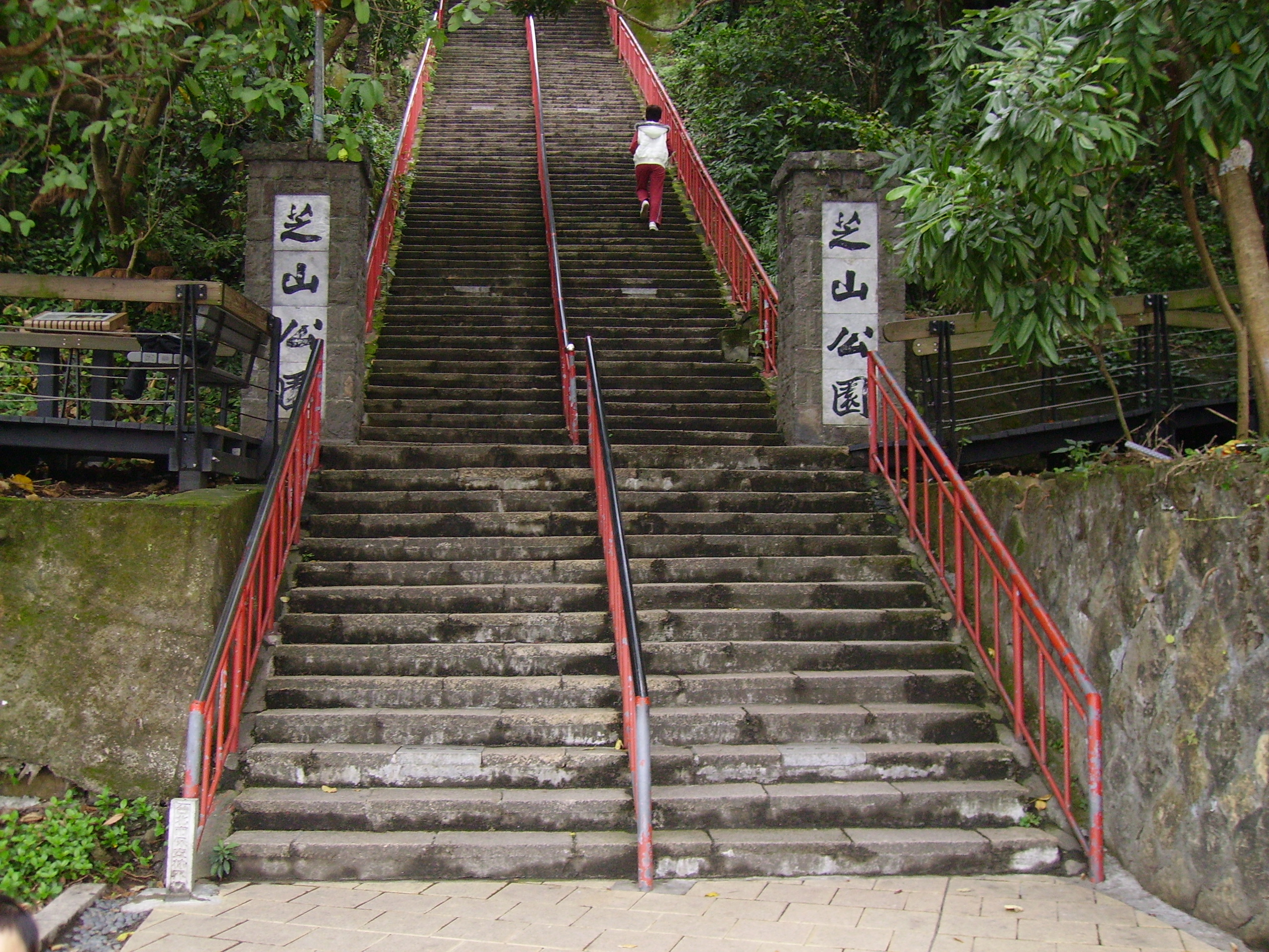 中文（台灣）: 臺北市芝山公園百二十崁。